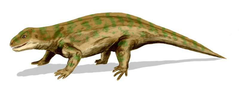 Diadectes, a permian reptiliomorph